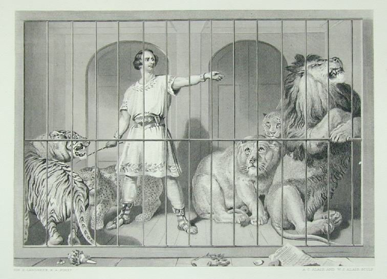 Van Amburgh und seine Großwildkatzen. Kupferstich Nach einem Gemälde Edwin Landseers in der Sammlung des Herzogs von Wellington. Veröffentlicht in London Art Journal, 1879